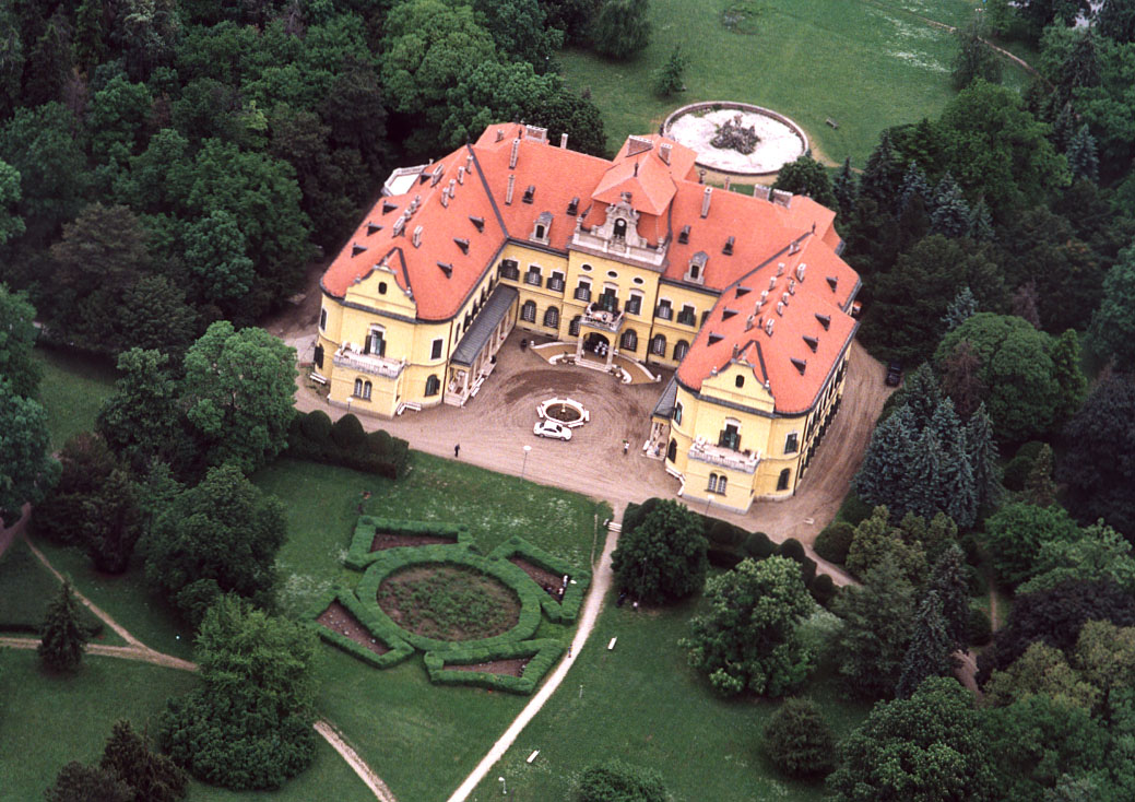 Palace- Nagymágocs - Hungary - Europe